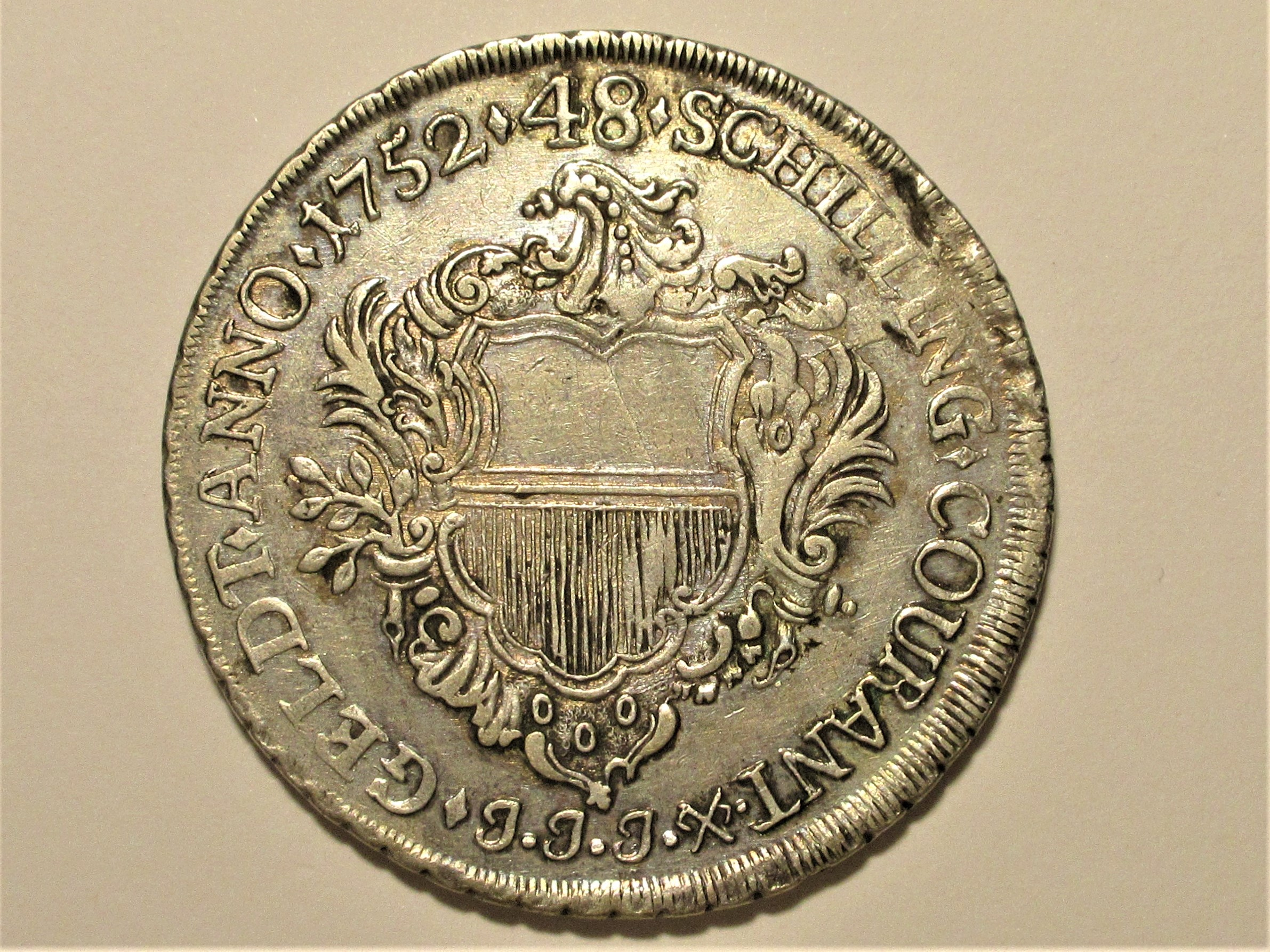 Wappenseite der 48 Schillingemünze von 1752, Behrens 291